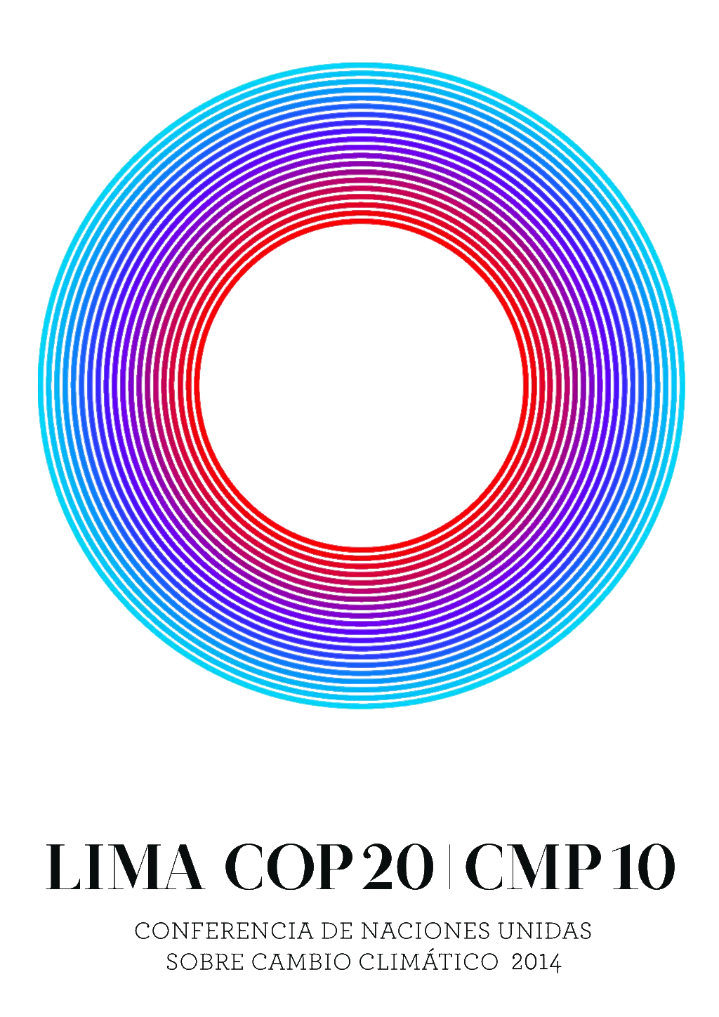 Logo de la Conférence de Lima (COP20).